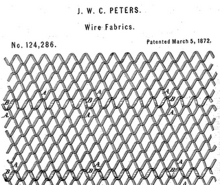 Изображение сетки Рабица